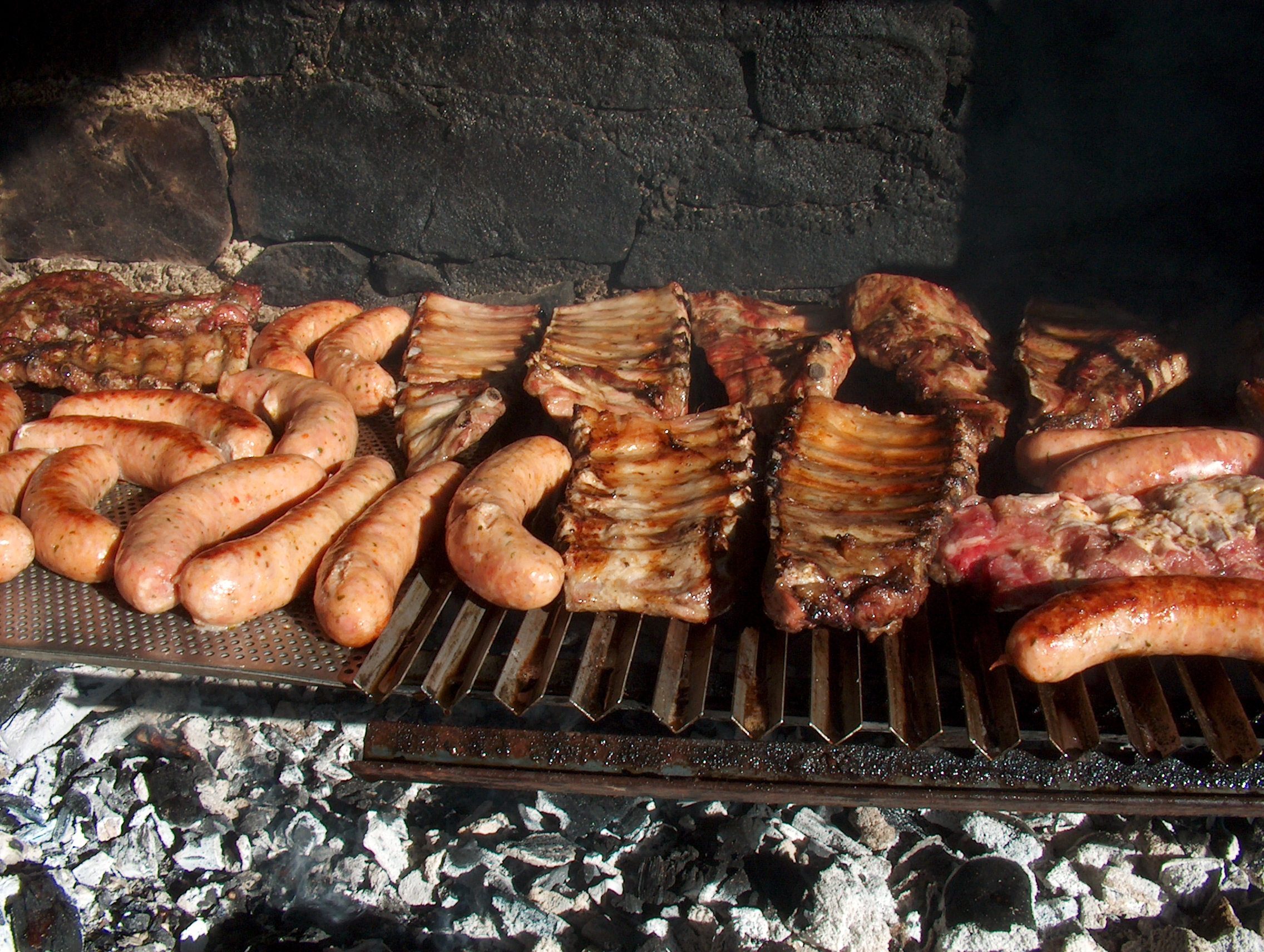 Parrillada